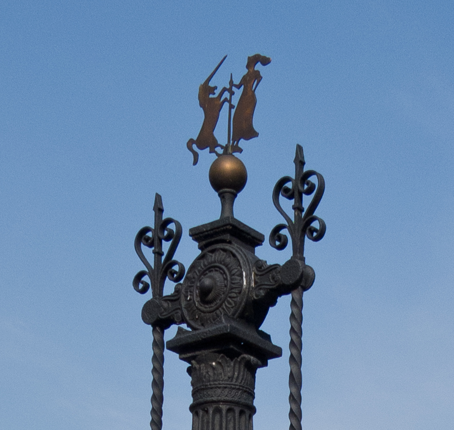 波蘭新城集市廣場西南邊，一座19世紀下半葉折衷主義風格的鐵井，上有華沙新城的象徵『女孩與獨角獸』